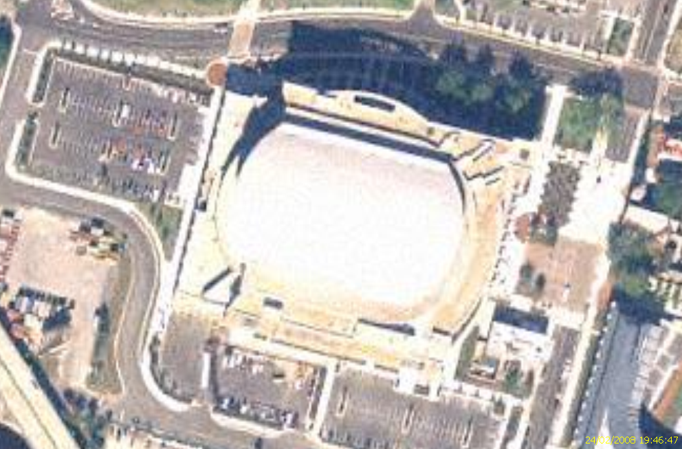 Image satellite de la Jacksonville Veterans Memorial Arena Image satellite provenant de NASA World Wind (Zoom it)